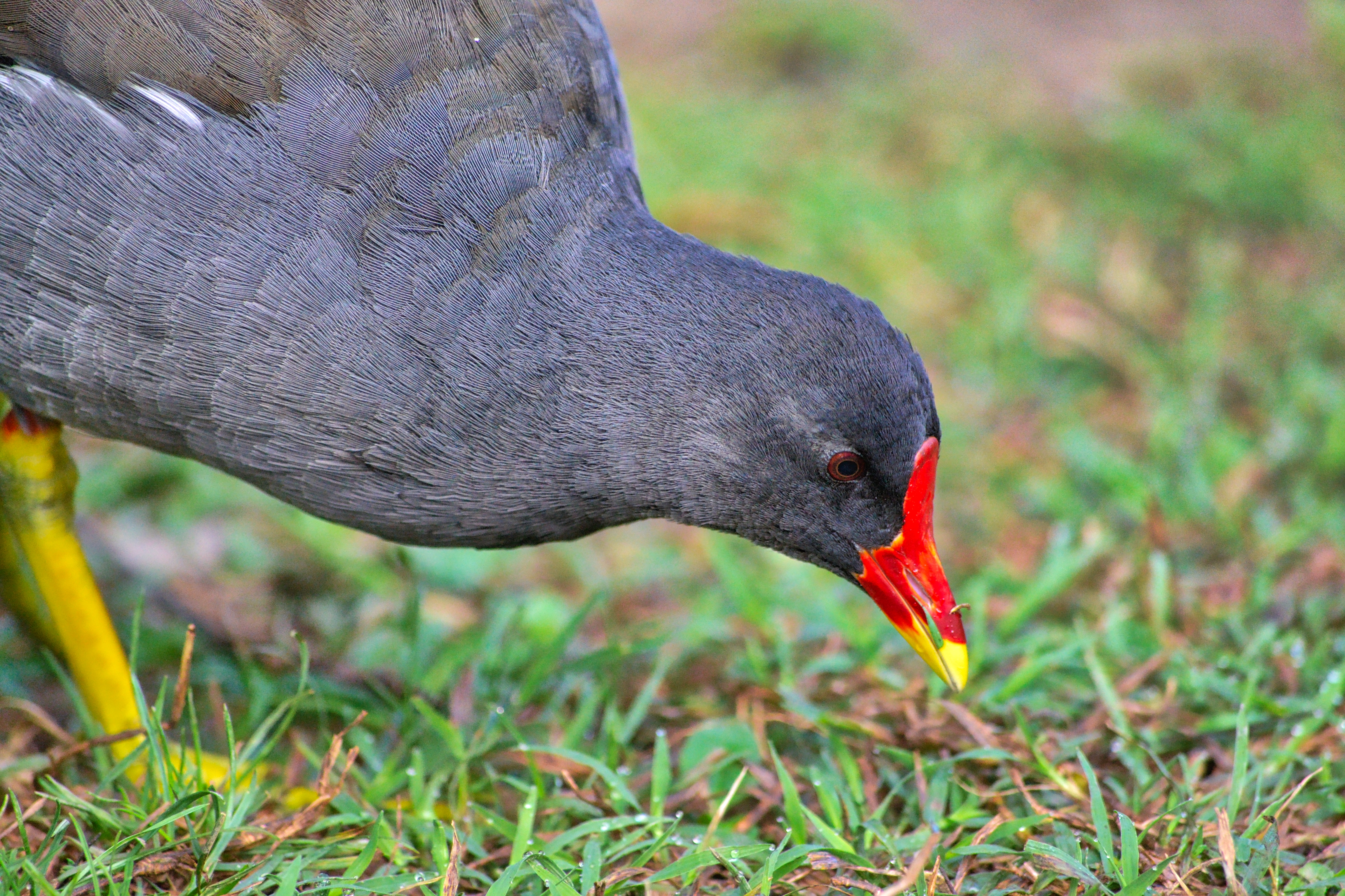 Gallinella d'acqua